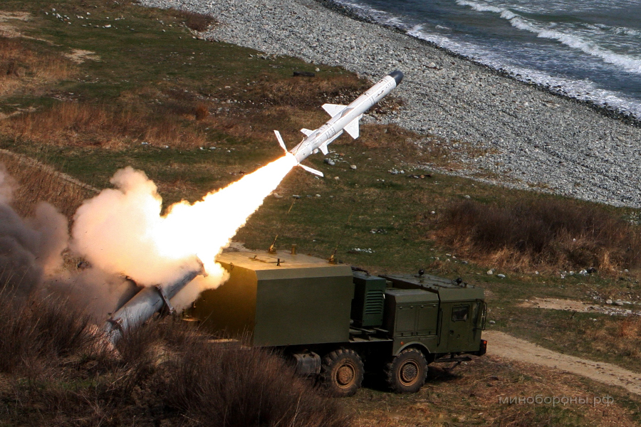 Учебно-боевые стрельбы расчетов берегового ракетного комплекса «Бал» Тихоокеанского флота (Приморский край)